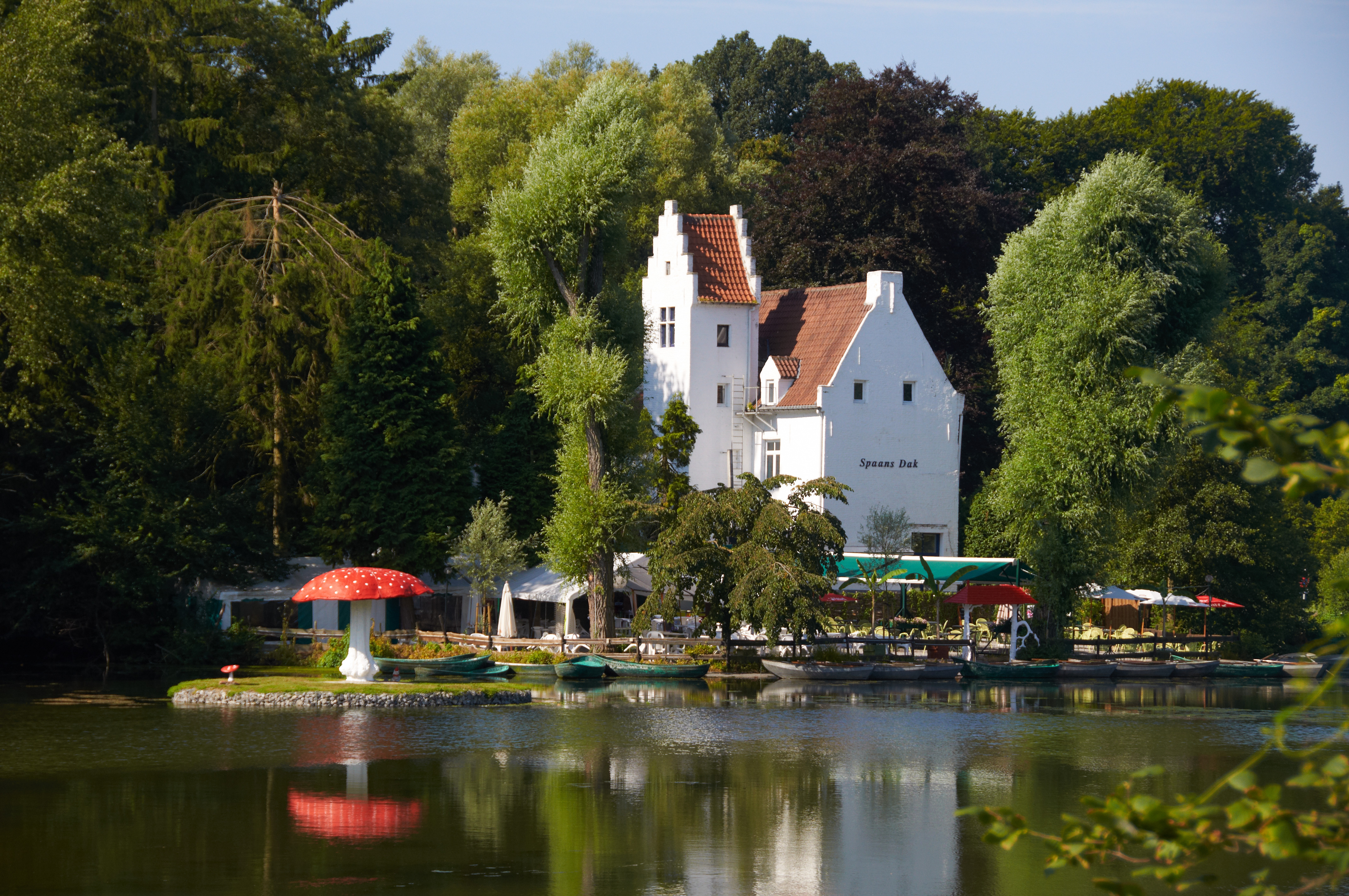 Spaans Dak en Paddenstoel in Zoet-Water in Oud-Heverlee, België 99″ N, 4° 39′ 17.6″ E